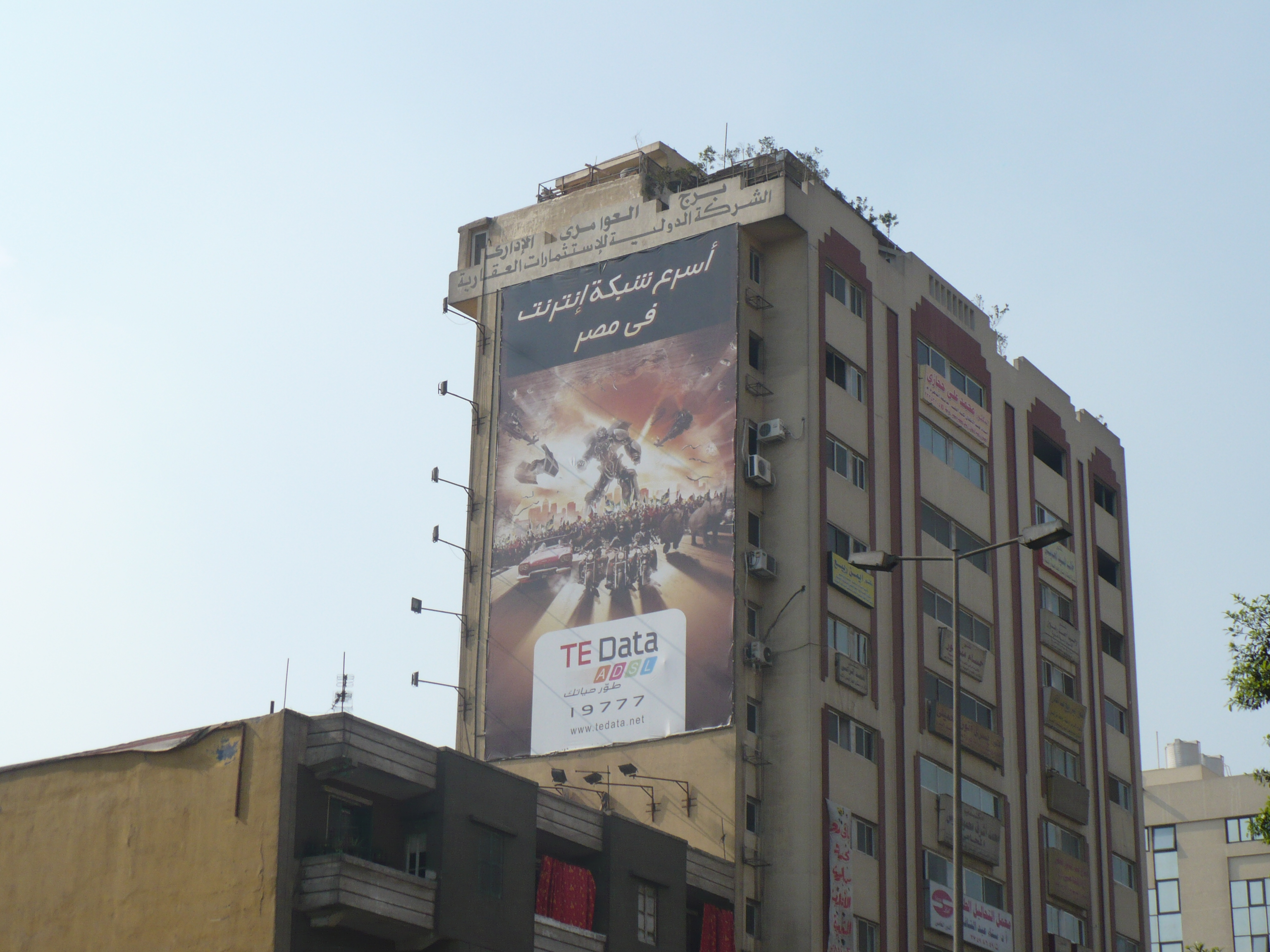 اعلان شركة tedata